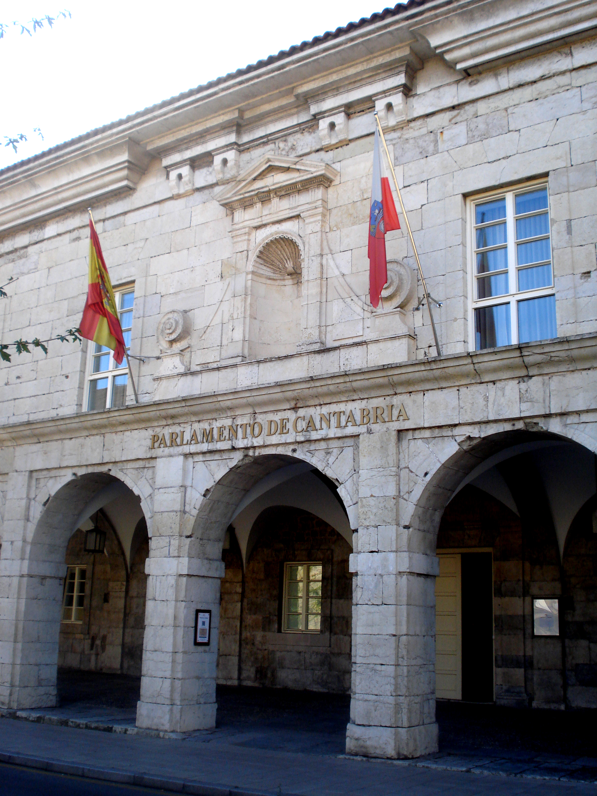 Parlamento de Cantabria(Antiguo Hospital de San Rafael)